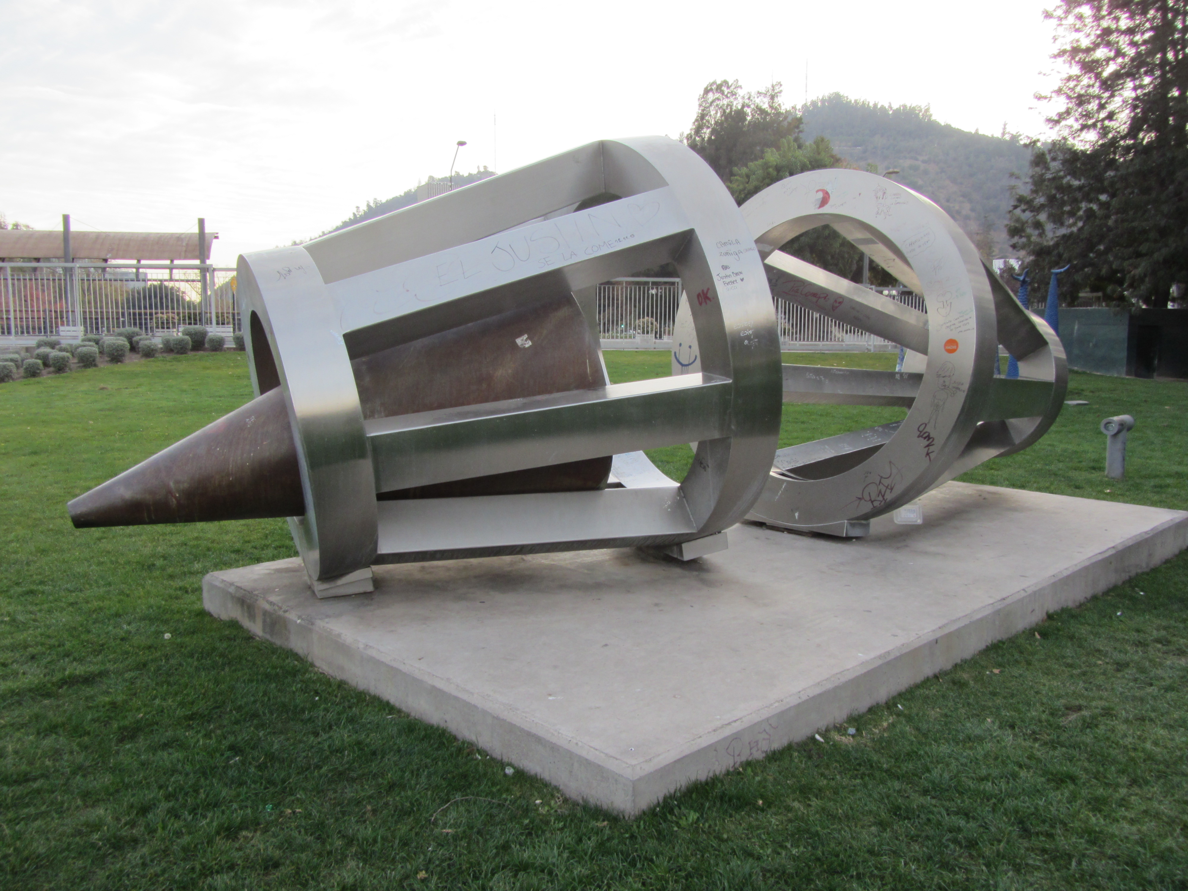 Yantra - Mandala, de la escultora chilena Aura Castro; Parque de las Esculturas de Providencia, Santiago de Chile.